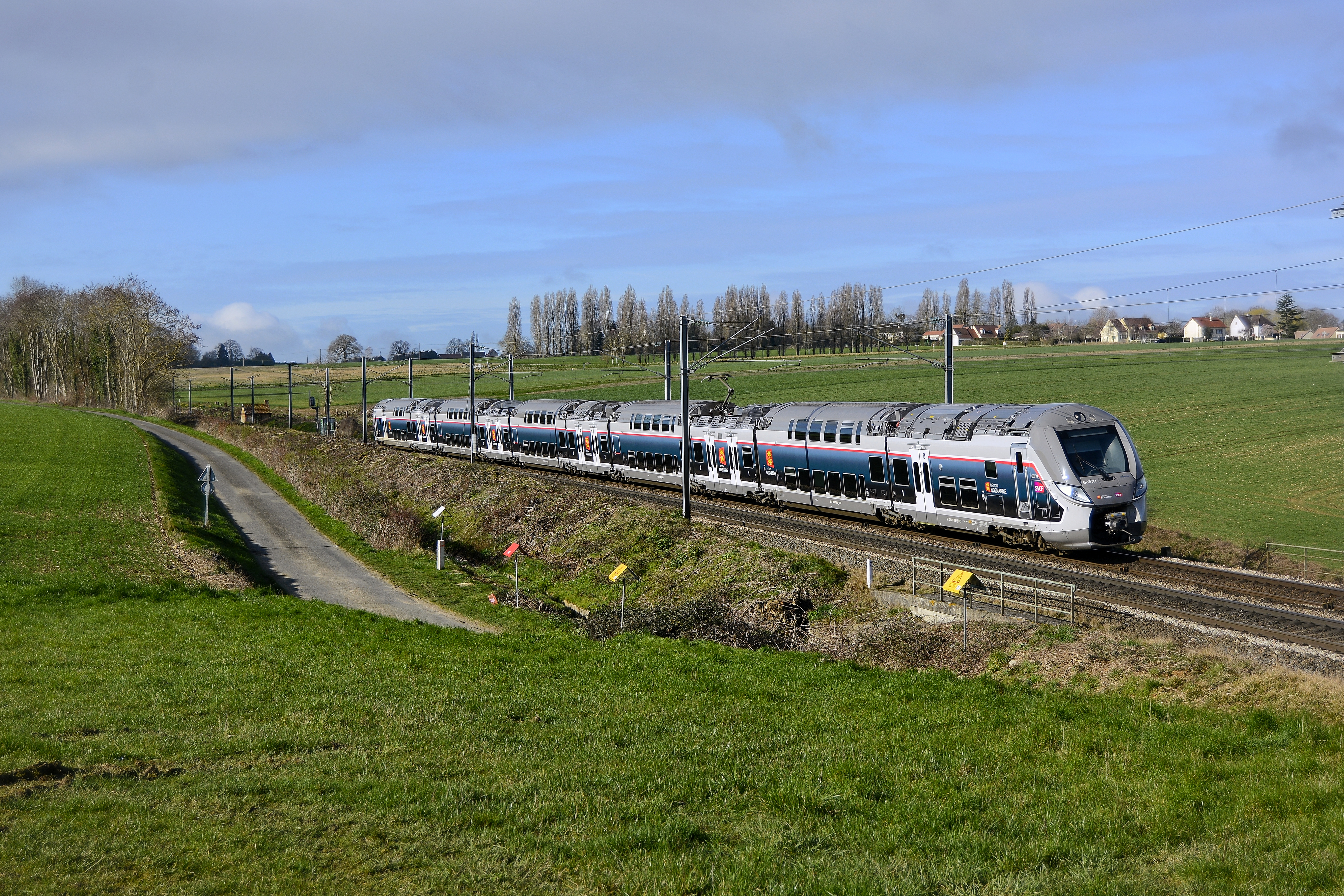 Z56600 (Omnéo Premium) 605XL près de Ménerville sur un TER reliant Caen à Paris Saint-Lazare le 07/03/2020.